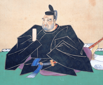 南部信順の肖像。